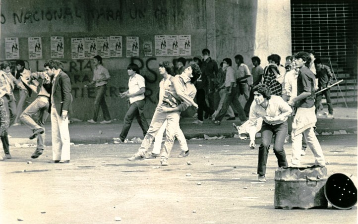 1 - 5 - 1984 Chile. Santiago. Cercanías del Parque O'Higgins. Manifestación organizada por el Comando Nacional de Trabajadores - CNT. Segun el oficio conductor y en referencia se señala que las fotografías muestran "...desmanes provocados por elementos de izquierda -entre los que se incluyen activistas del MIR- en el transcurso y con posterioridad a la manifestación opositora organizada por el Comando Nacional de Trabajadores...".